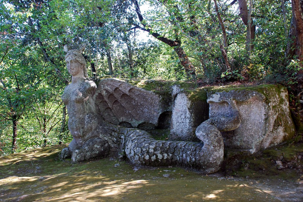 Echidna - Furia alata